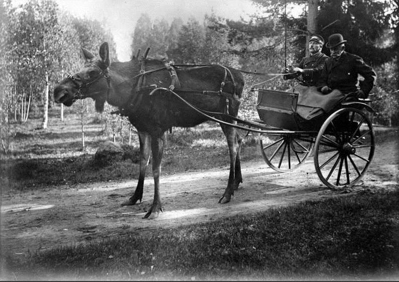 Älgen Stolta drar gigg med två män i Järnvägsparken, Älvkarleö, Älvkarleby socken, Uppland 1908.